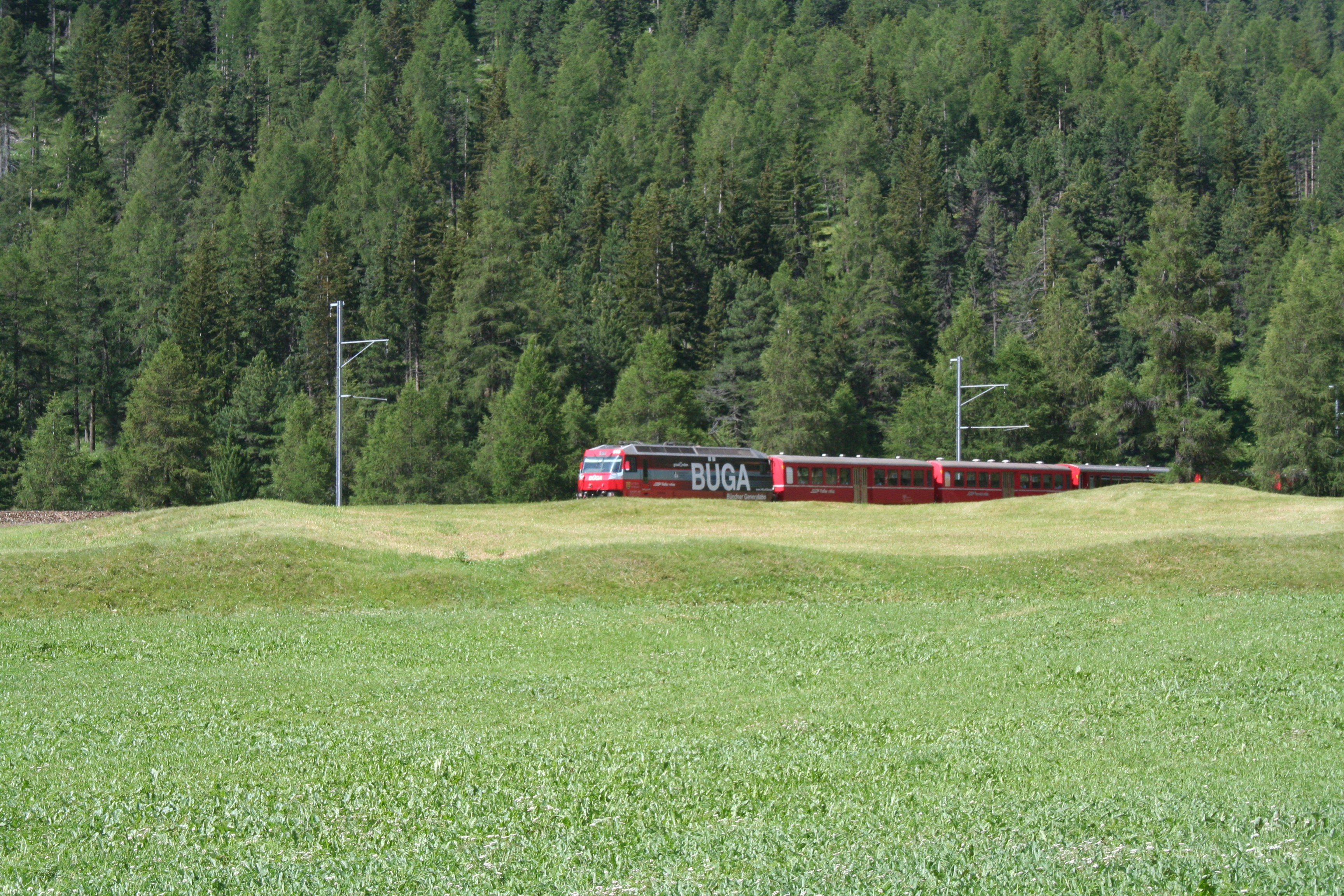 Zug der RhB bei Bever